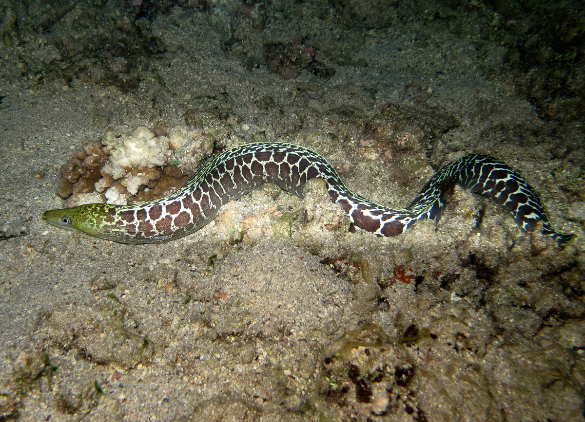 Une murène ondulante (Gymnothorax undulatus) à la Réunion.